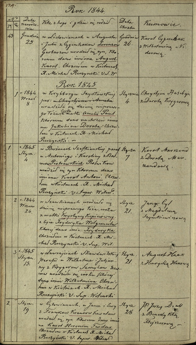 Метрика Краузе И.И.